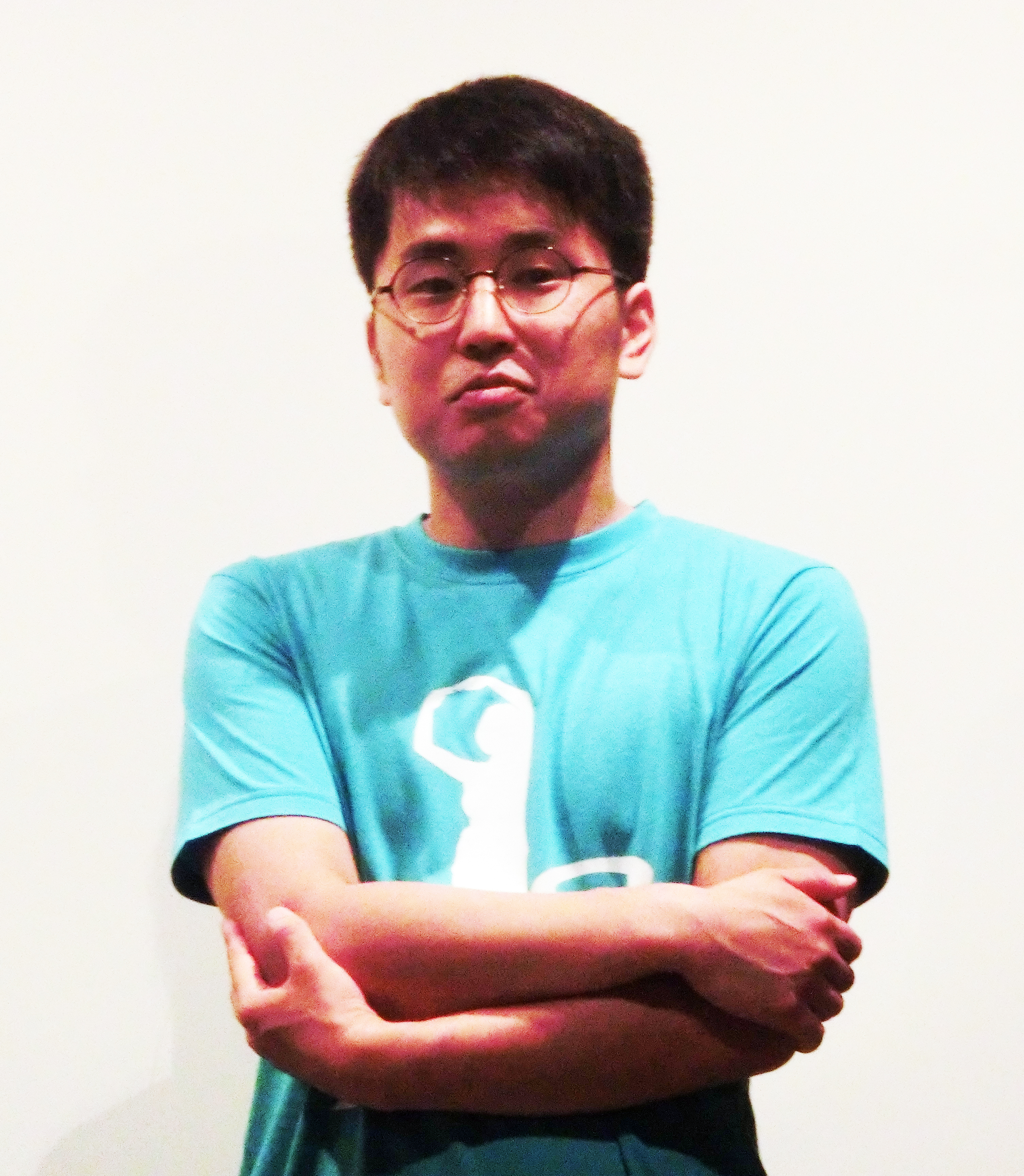 上野オークラ劇場2019年8月10日舞台挨拶